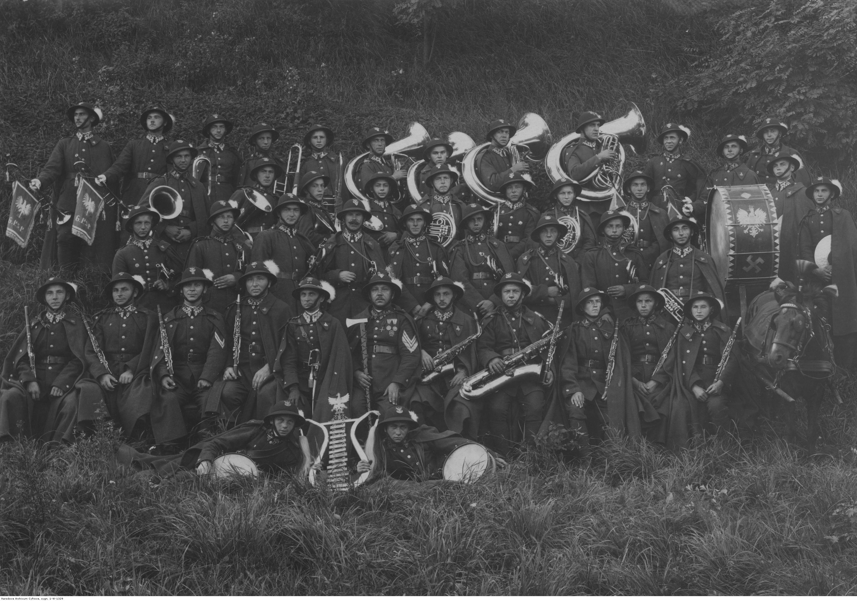 Orkiestra 6 Pułku Strzelców Podhalańskich w Sanoku - fotografia grupowa po wygranym konkursie muzycznym; z ciupagą kapelmistrz por. Jarosław Vorel. Koncern Ilustrowany Kurier Codzienny - Archiwum Ilustracji. Sygnatura: 1-W-1329